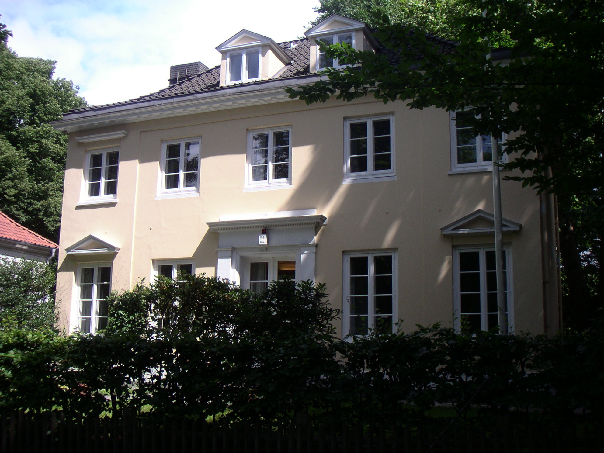 Hamburg, Rotherbaum, Mittelweg 185 This is a photograph of an architectural monument.